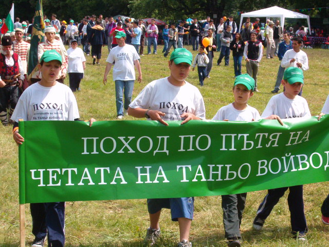 Кулминацията на националният поход "По стъпките на четата на Таньо Войвода" на връх Керчан баир до село Априлово, Поповско.